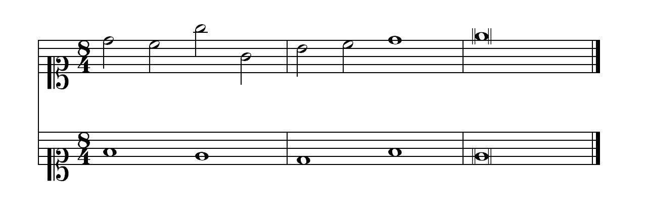 Näide range kontrapunkti reegli juurde, mis käsitleb rütmifiguure teises järgus 8/4 taktimõõdus kirjutatud teose lõpus. Kasutatud on programme Finale 2005 ja MS Paint. Antud noodinäide on lihtsustatud variant noodinäitest Knud Jeppeseni raamatust "Kontrapunkt" (Leipzig, 1956) lk 88.